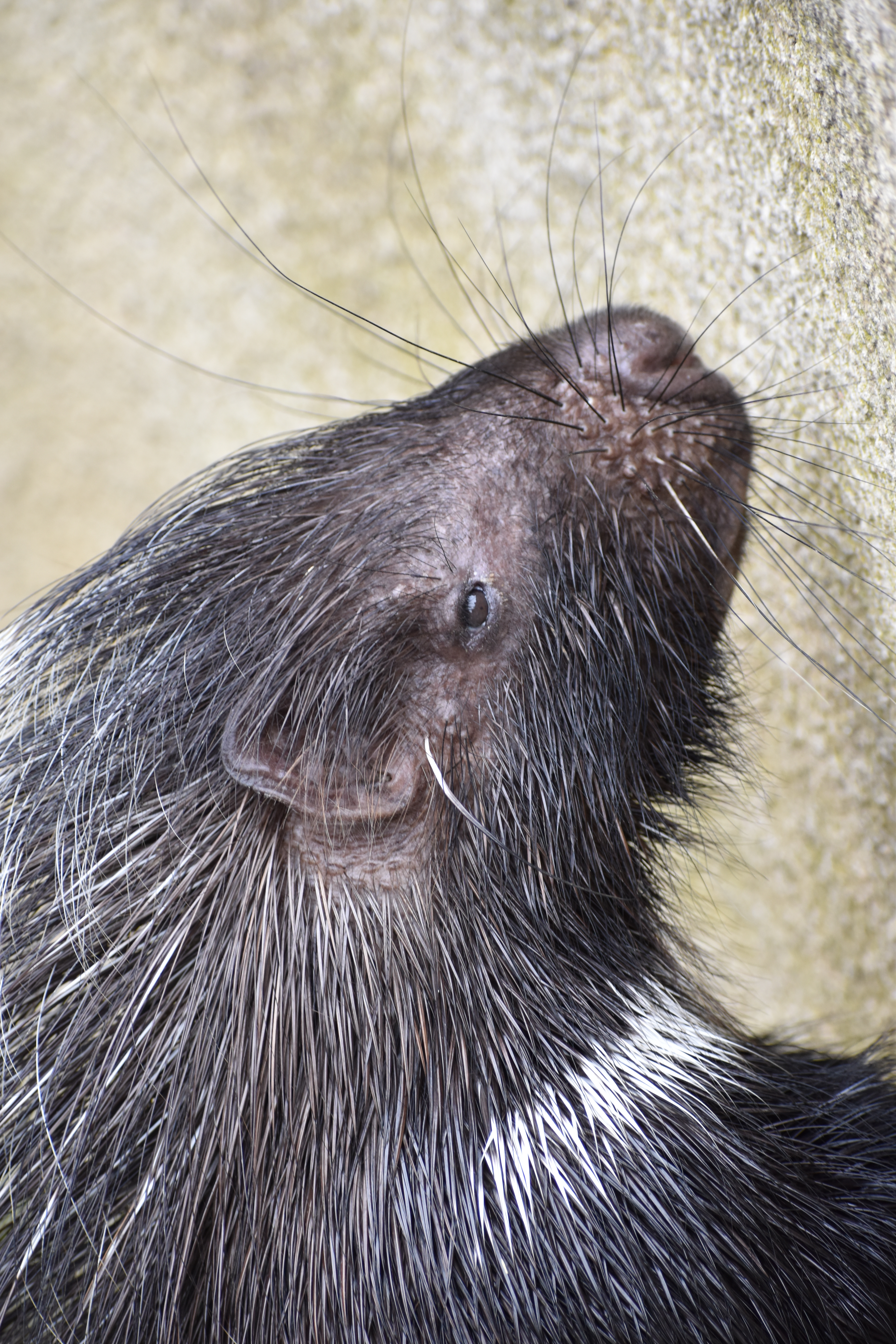 Porc-épic du Cap